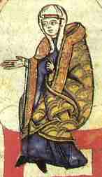 Matilde di Canossa dal Cod. Vat. lat. 4922